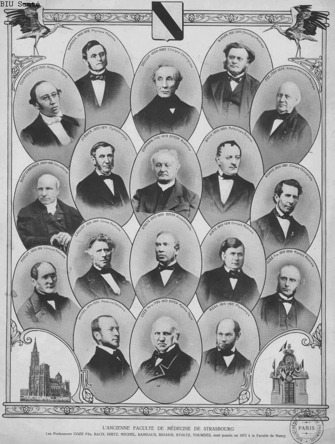 Réf. image : impharma_fi006x038 L'ancienne faculté de médecine de Strasbourg Mots-clés : Médecine. Medecin. 19e siècle (France) . 19e siècle s.d. Technique : Impr. photomécanique - Similigravure Tourdes / Rameaux / Sédillot / Wieger / Fée / Schützenberger / Stoeber / Ehrmann / Bach / Rigaud / Forget / Cailliot / Stoltz / Hirtz / Coze Fils / Michel / Coze Père / Küss Fiches bio-bibliographiques : TOURDES (Gabriel) - Adresse permanente de cette image